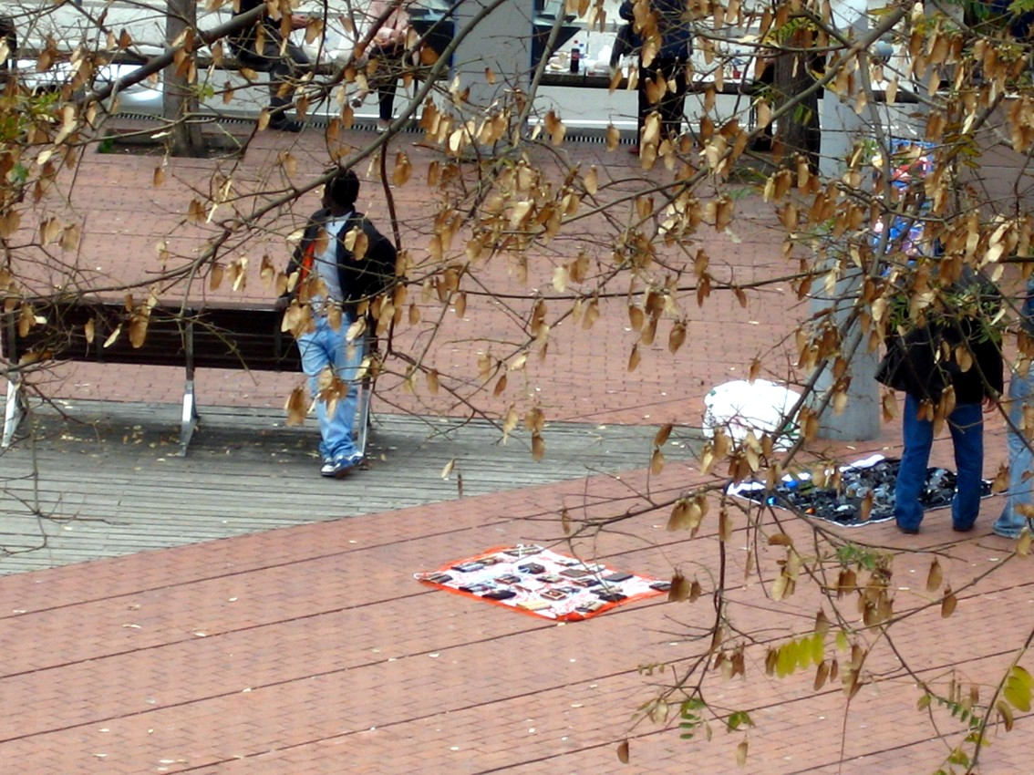 Top manta en Barcelona (zona del Aquari)